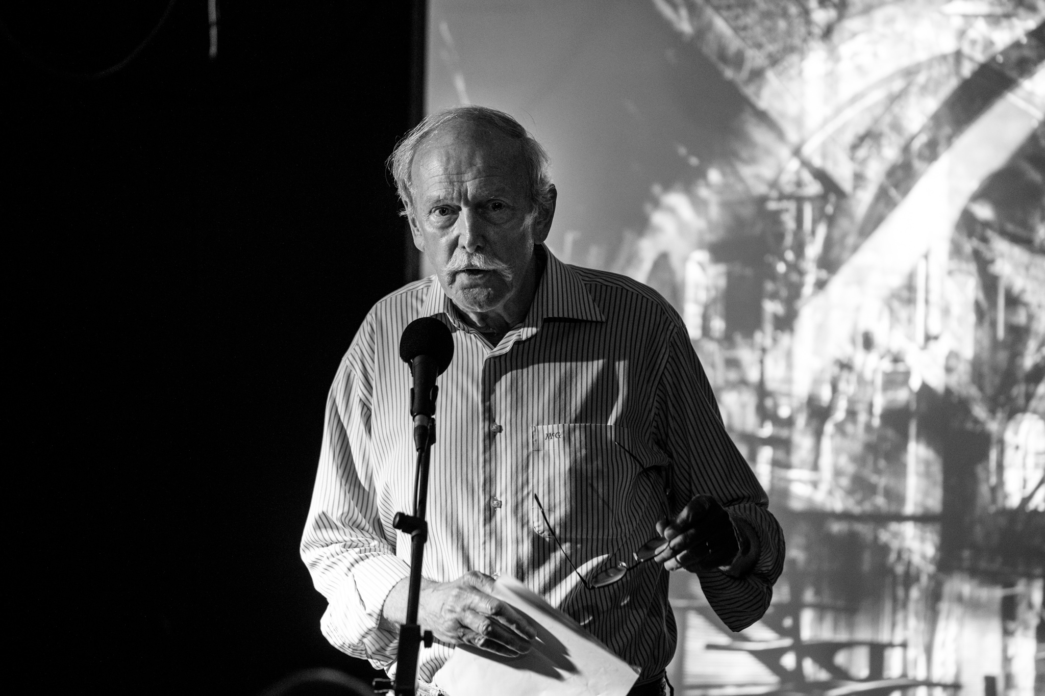 H.C. Ten Berge leest voor uit eigen werk op de presentatie van het twaalfde nummer van het literaire Tijdschrift Terras in de Vondelbunker in Amsterdam.